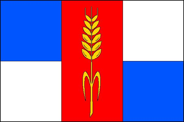 Vlajka obce Počenice-Tetětice